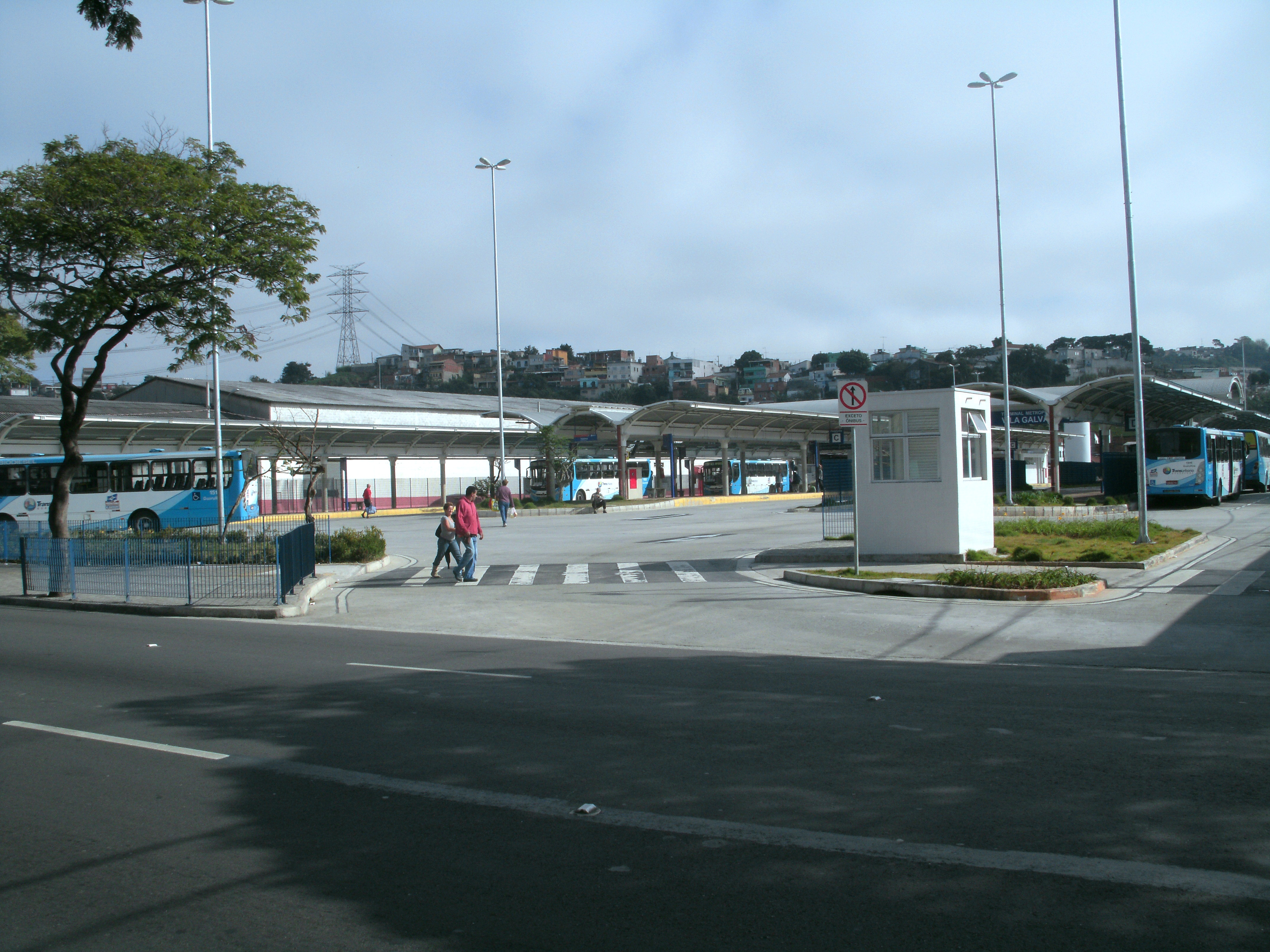 Terminal Metropolitano Vila Galvão - EMTU